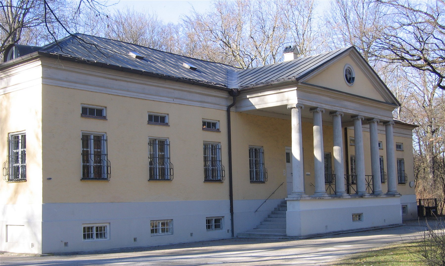 Rumfordhaus im Englischen Garten in München